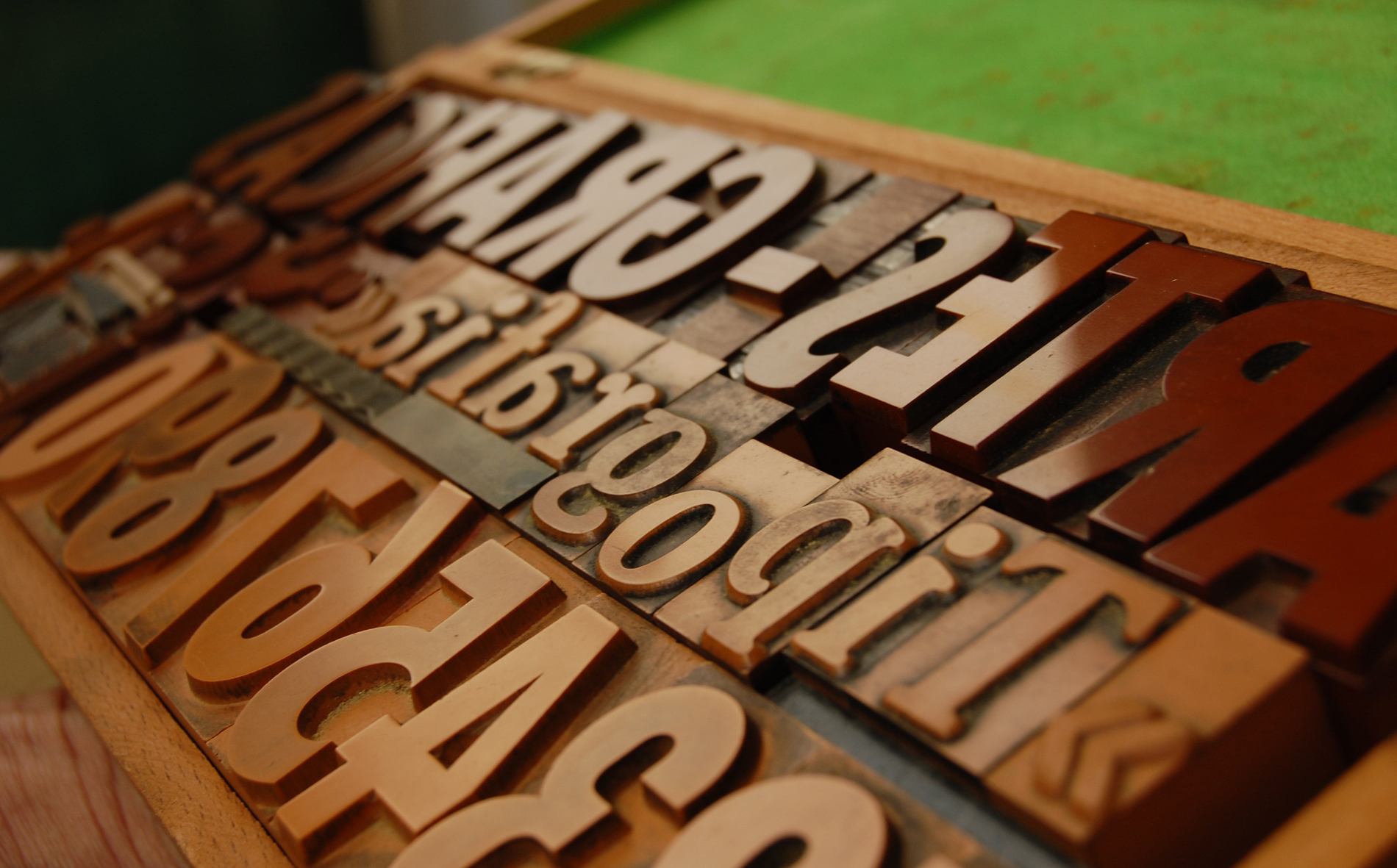 Tipus madera